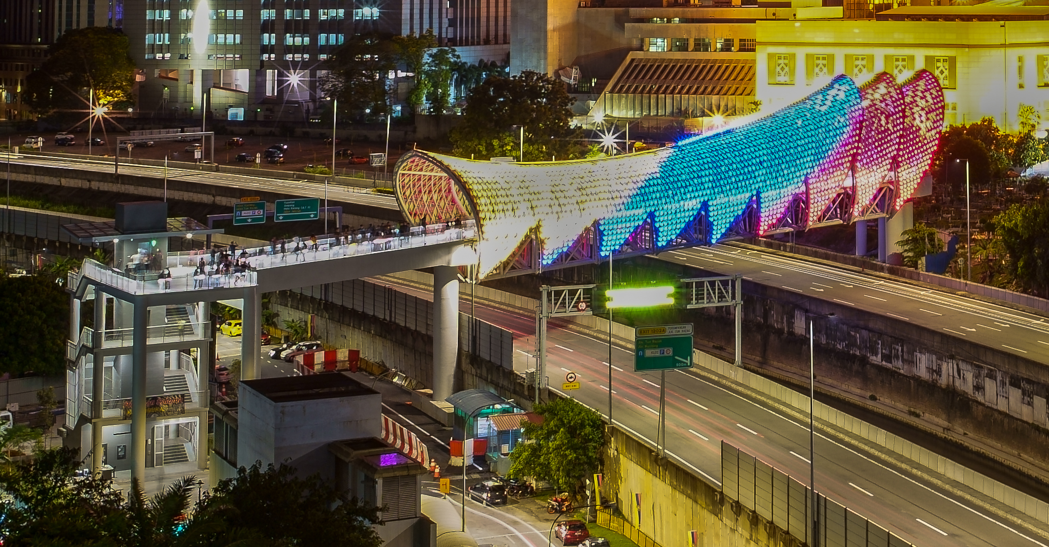 Saloma link at night